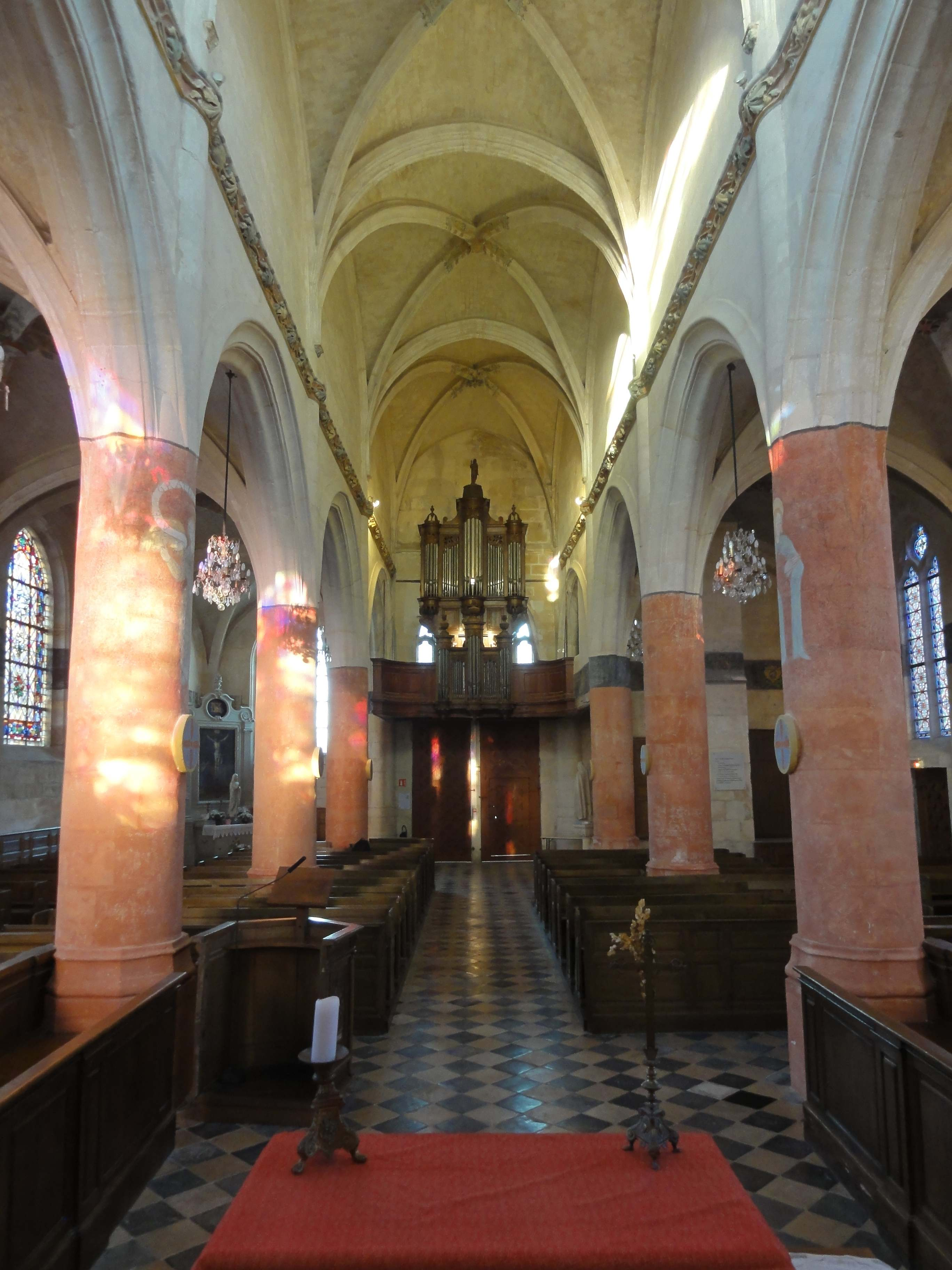 Intérieur de l'église - voir titre.